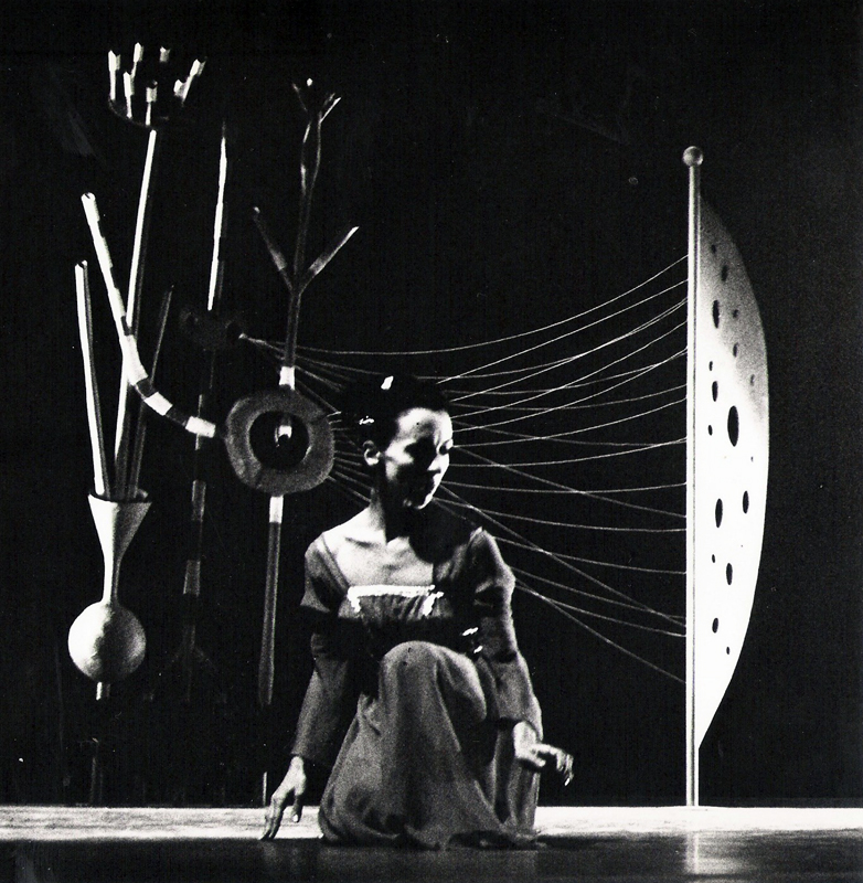 מתוך היצירה "בבואות", 1967; כוראוגרפיה: רינה גלוק, סט: דני קרוון (באדיבות להקת מחול בת-שבע). (באדיבות להקת מחול בת-שבע)